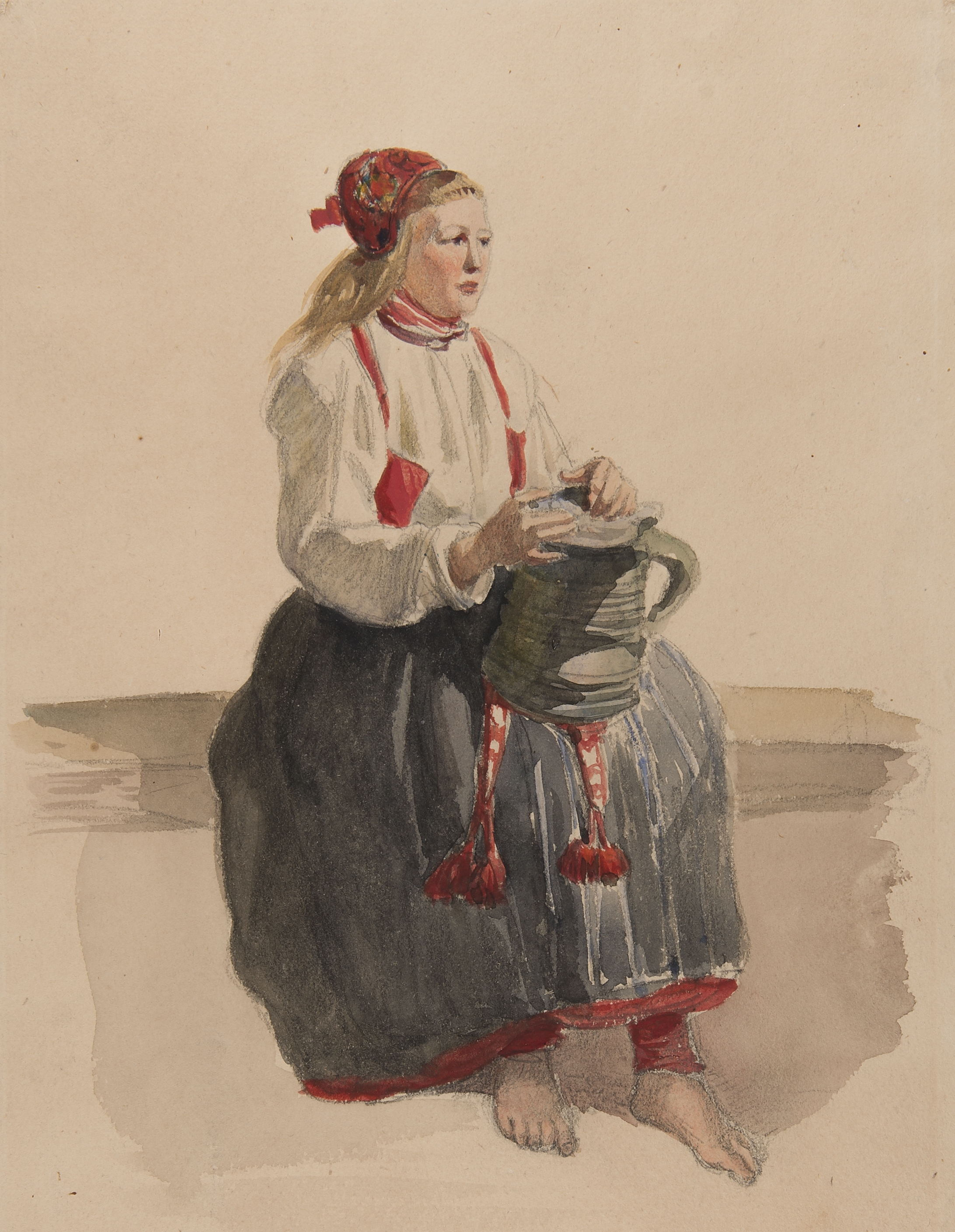 Ung kvinna i dräkt sittande i helfigur Akvarell av J.W. Wallander. Depicted place: Delsbo socken (Q10468283)